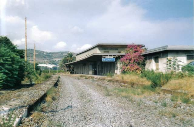 Autore: Emanuele-206 Fonte: File recuperato da una foto cartacea Degrado della stazione di San Lorenzo-Cipressa